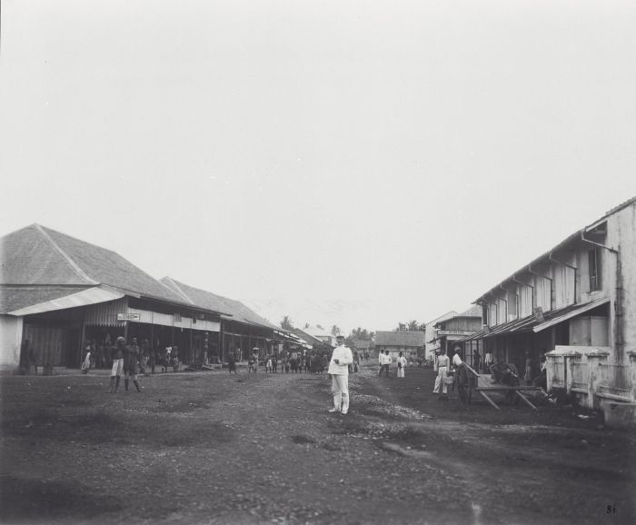 Foto. Straatbeeld te Parepare, Celebes